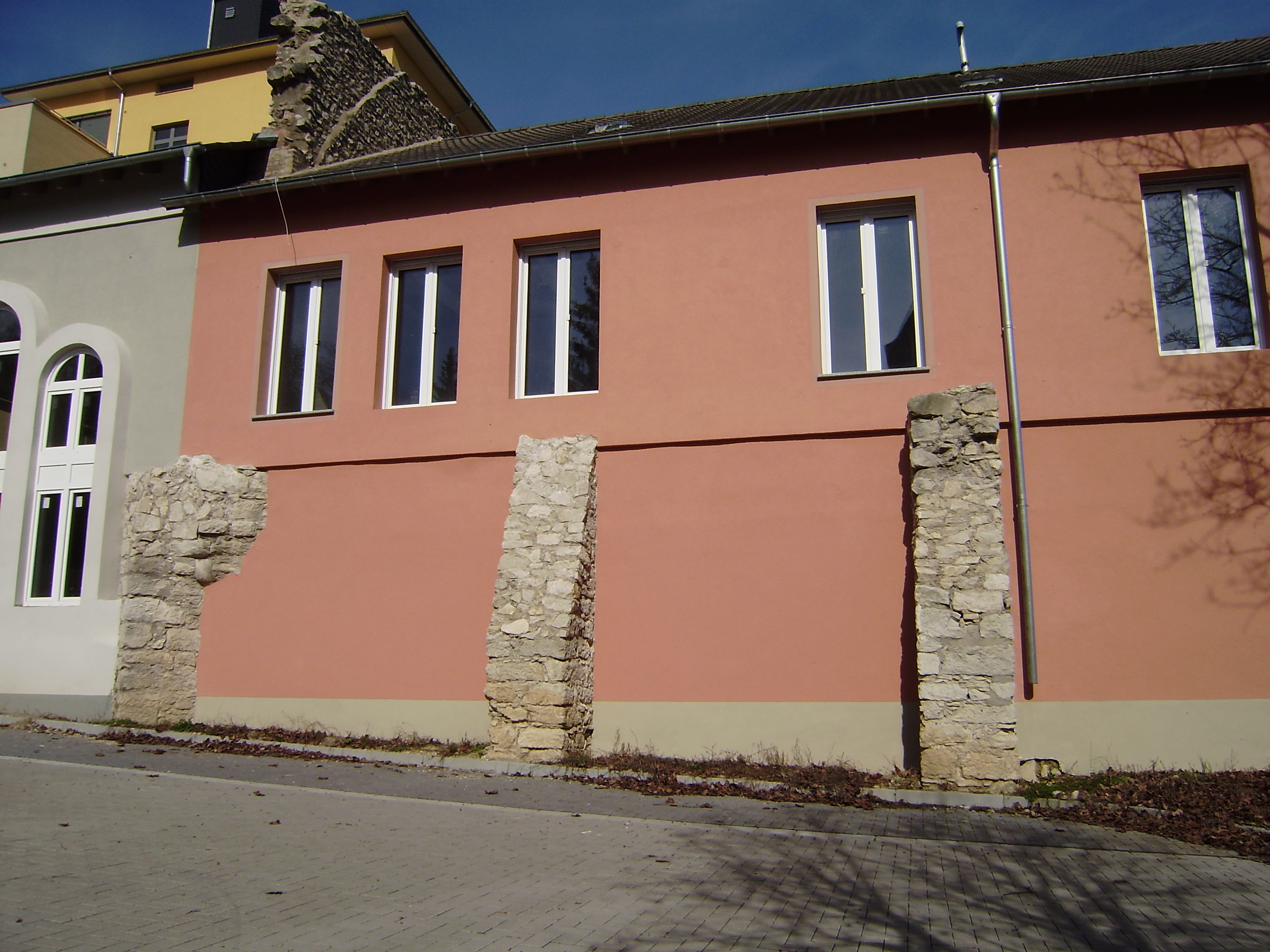 Kloster Mariacron, Oppenheim, Stütz- und Trennmauerreste in ehemaliger Weinbrennerei von Süden